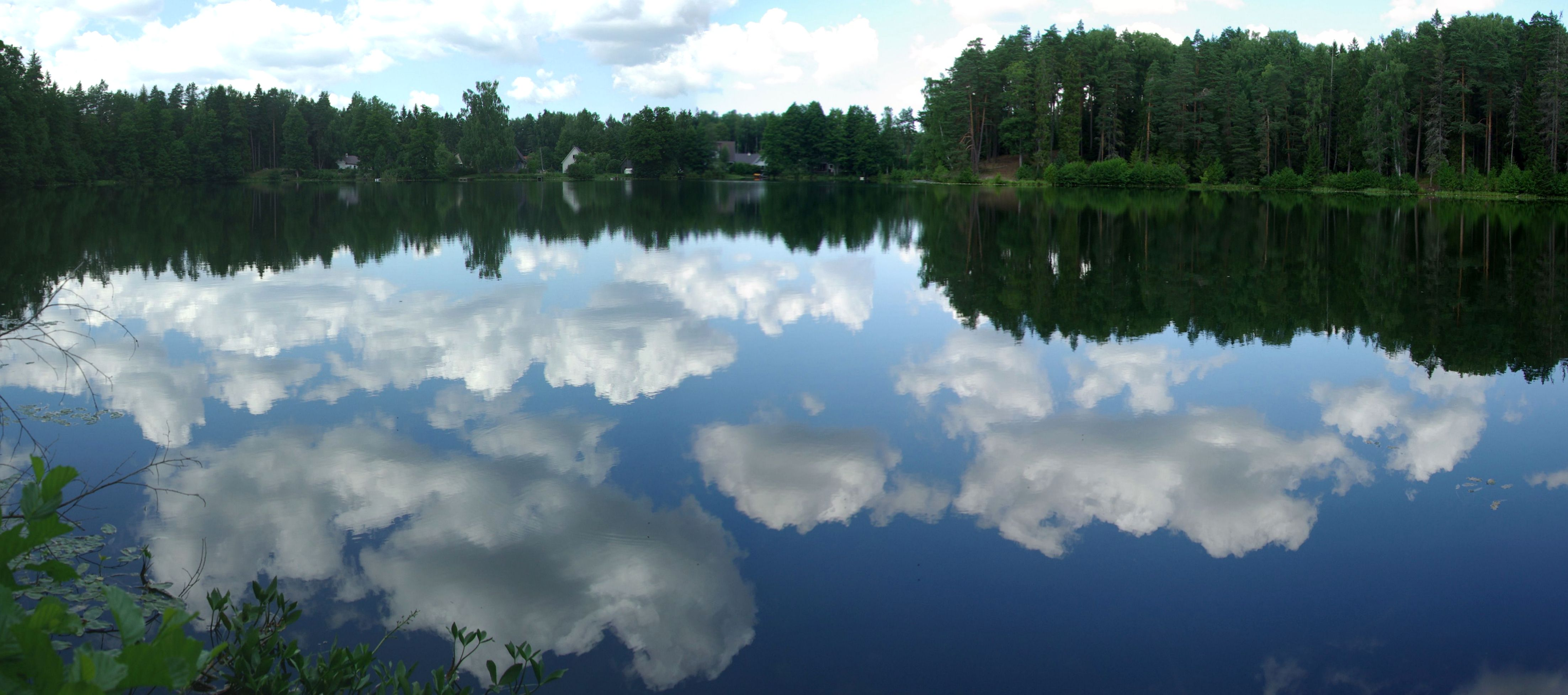 on järv Eesti loodeosas Harju maakonnas Nelijärves, üks Nelijärve järvedest.